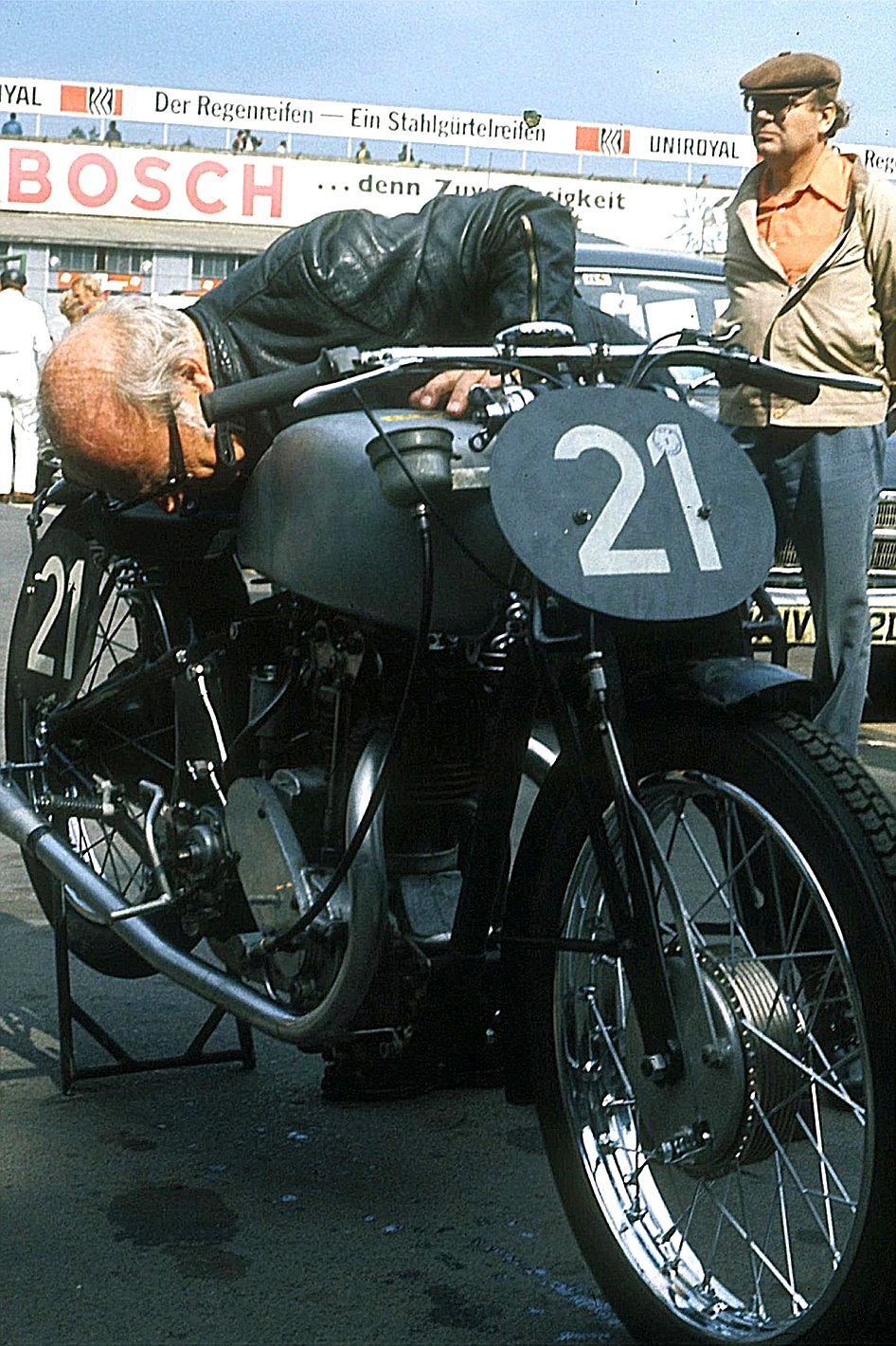 Erwin Aldinger (Jahrgang 1908?) mit seiner Imperia beim Oldtimer-Grand-Prix des AvD 1975 auf dem Nürburgring.